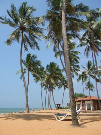 Luca Gorlero